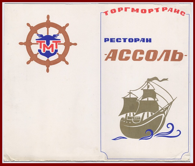 Первый вариант меню ресторана 1975 год.